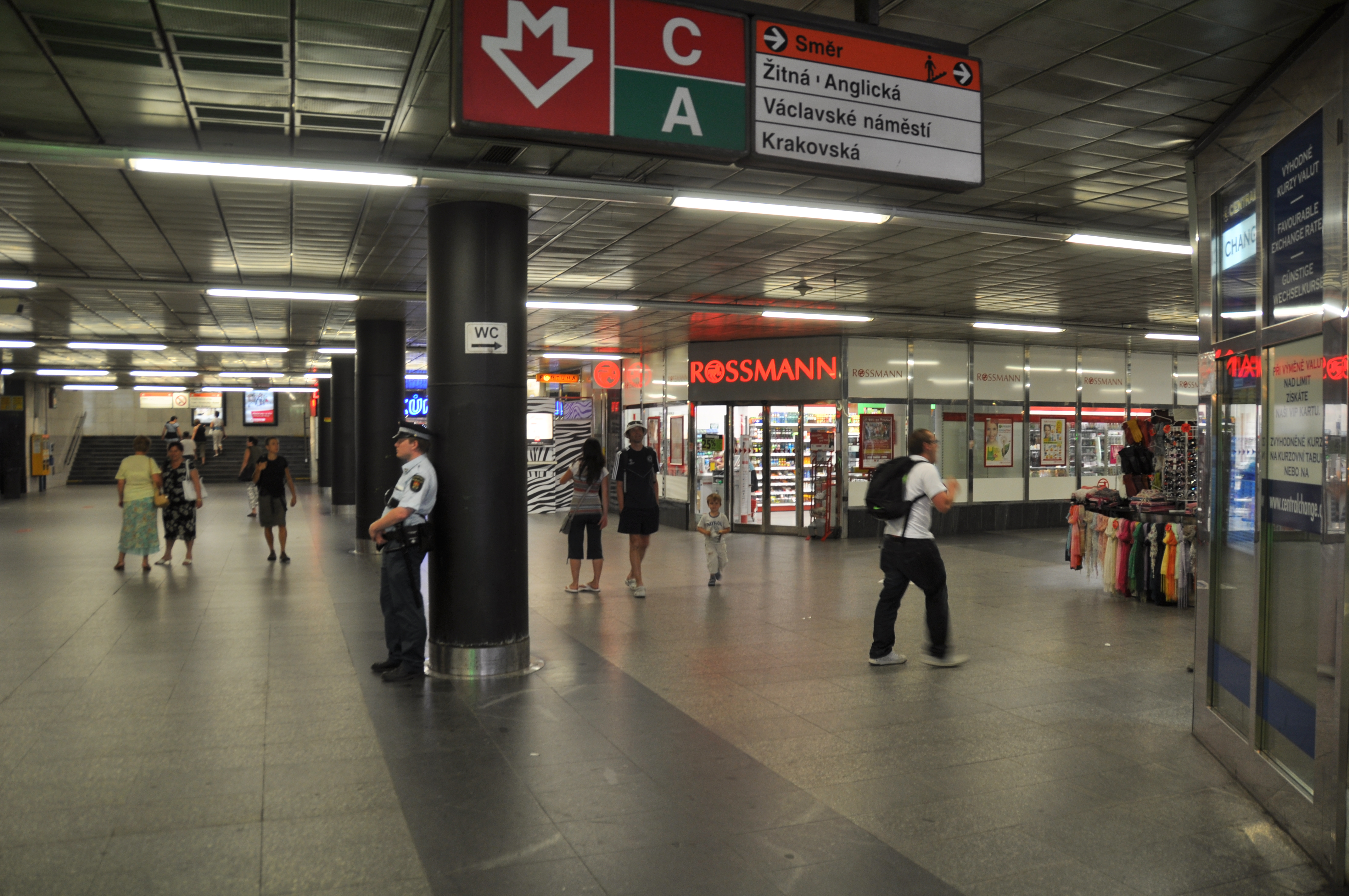 Metro Praha